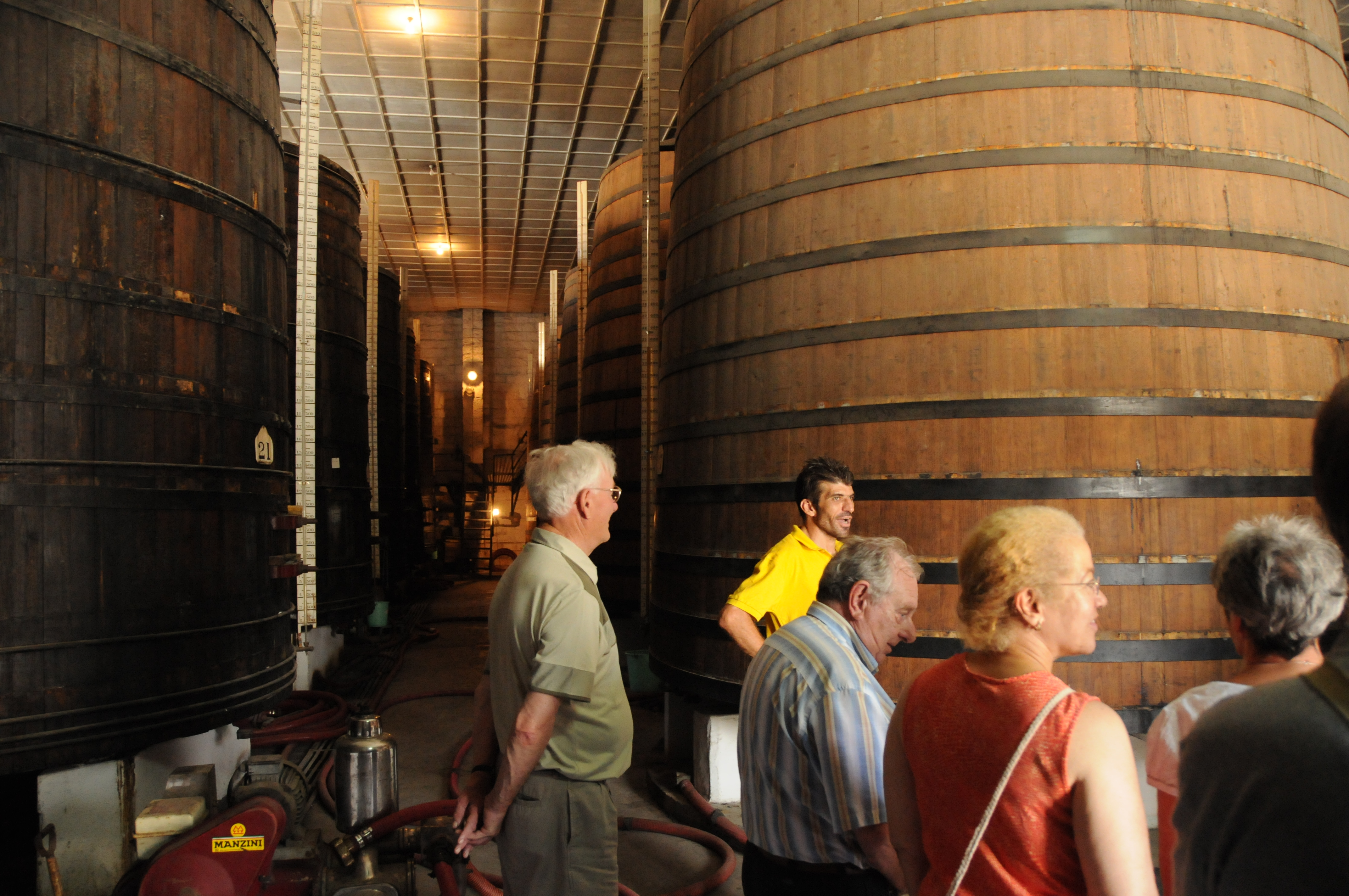 Foudres de stockage des vins à la cave de Limassol